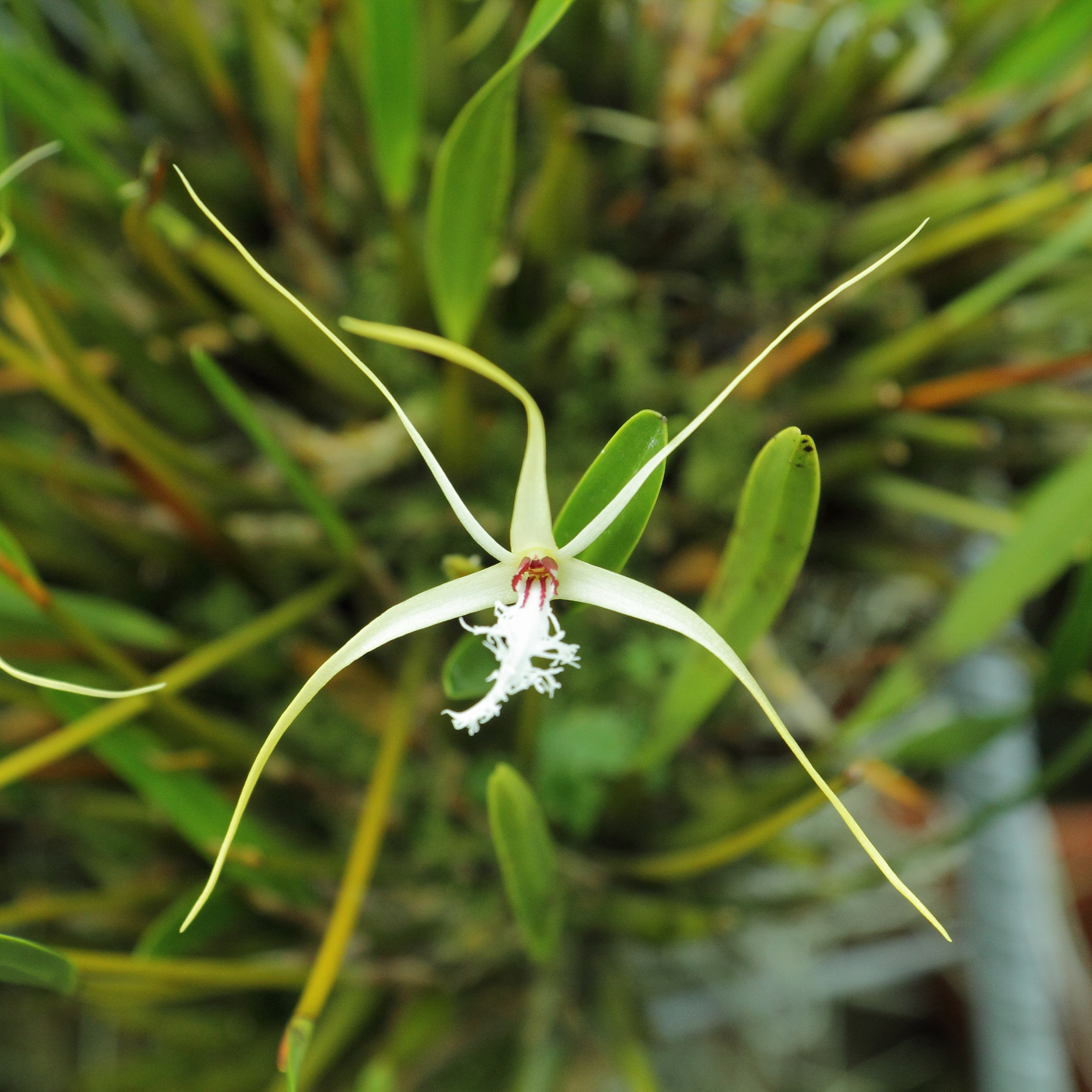 Diplocaulobium tipuliferum at Uppsala Botanic Gardens